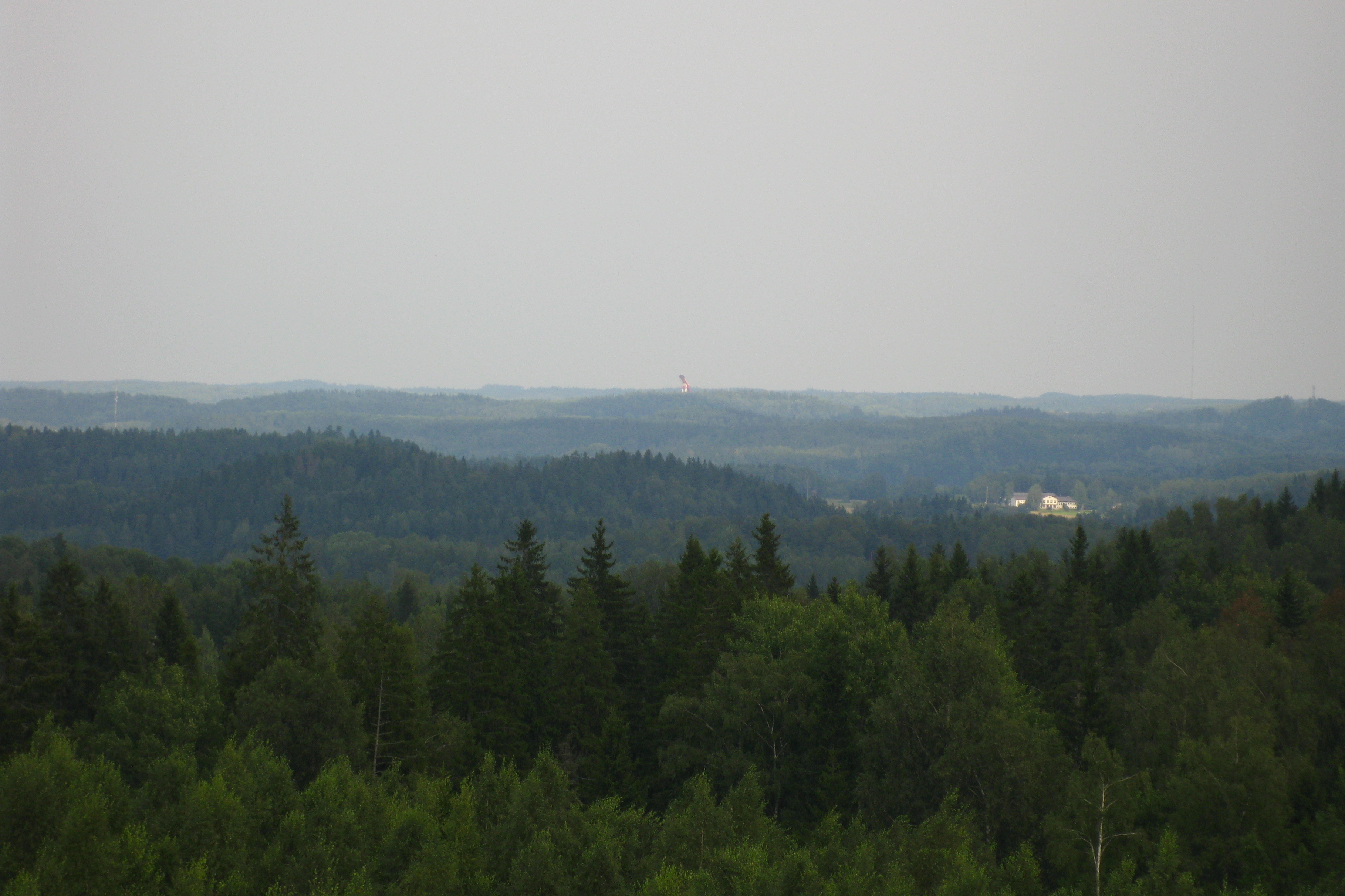 Otepää kõrgustik, vaade Harimäe tornist kirdesse, Otepää Looduspark